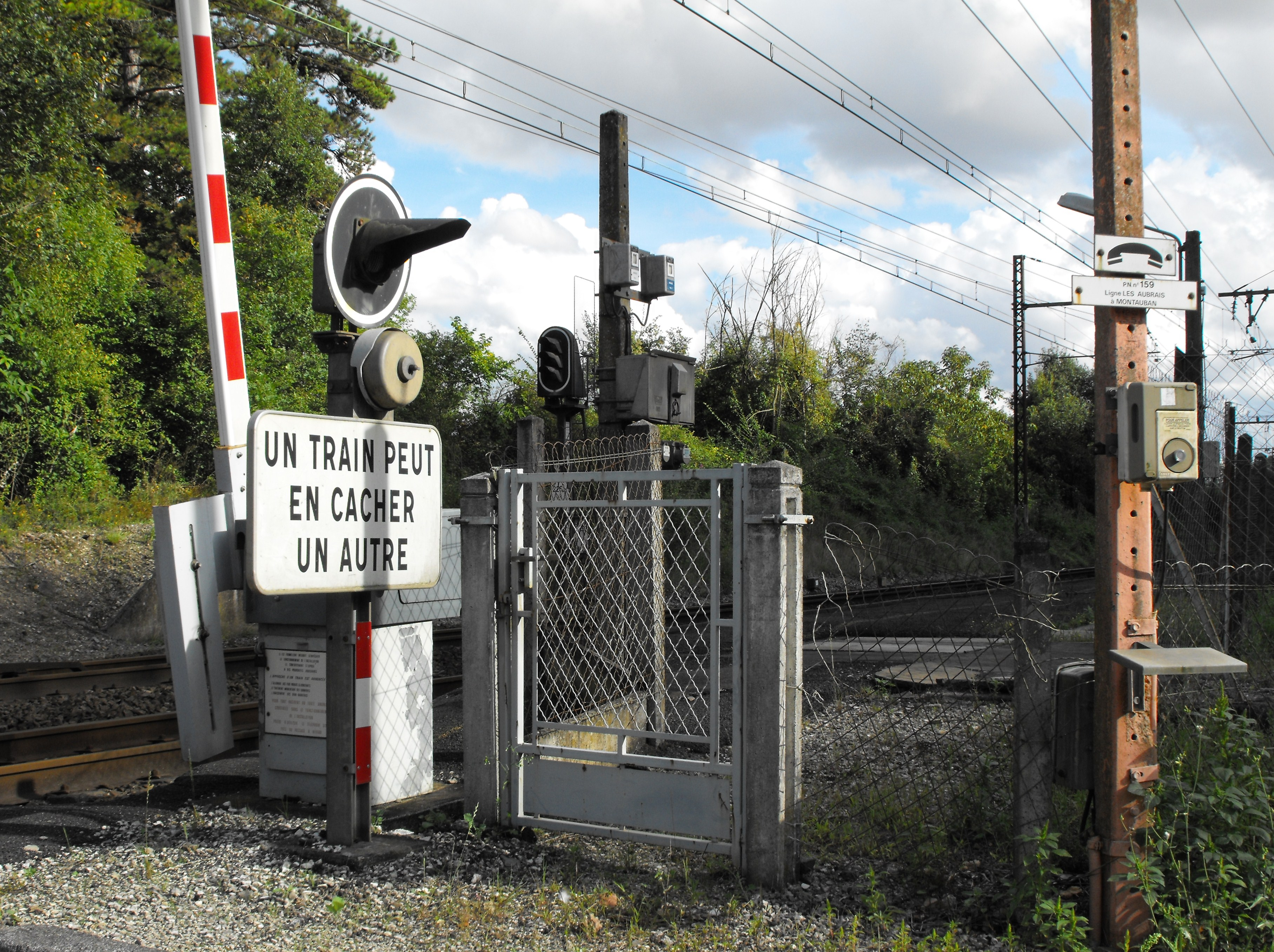 Gare de Diou, Indre (France), PN 159, août 2014